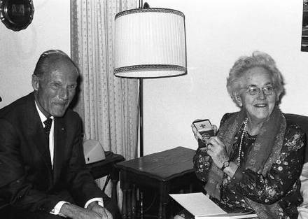 Freiburg im Breisgau: Eleanor Lansing Dulles bei Oberbürgermeister Eugen Keidel